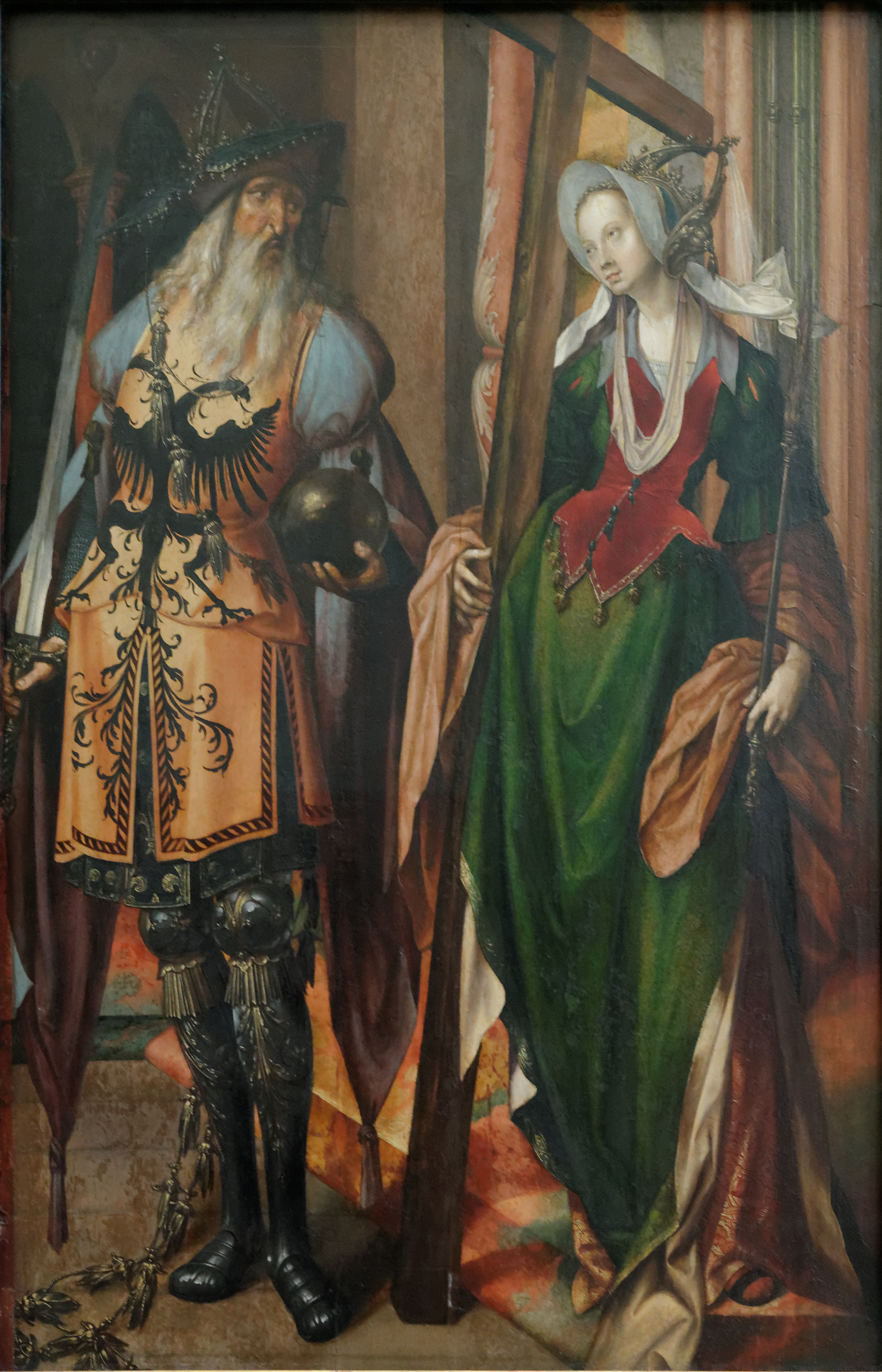 Constantin Ier (empereur romain) et sa mère Helena